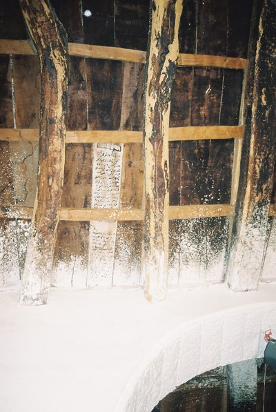 النقش التاسيسي لمدرسة الشيخ النقيب عفيف الدين ابن عبد الصمد ابن علي الحاير